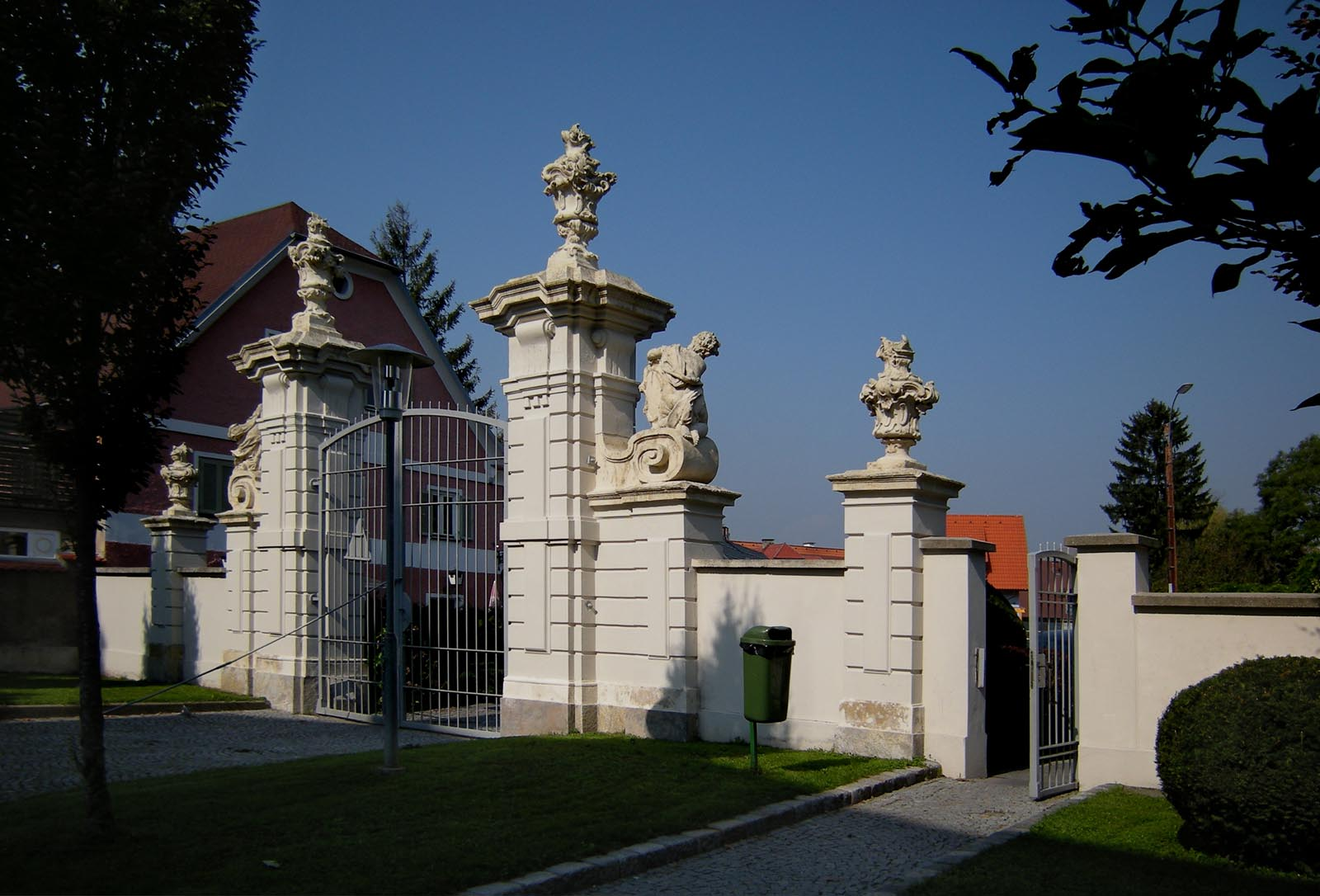 BG-BORG_HIB_Graz_Liebenau